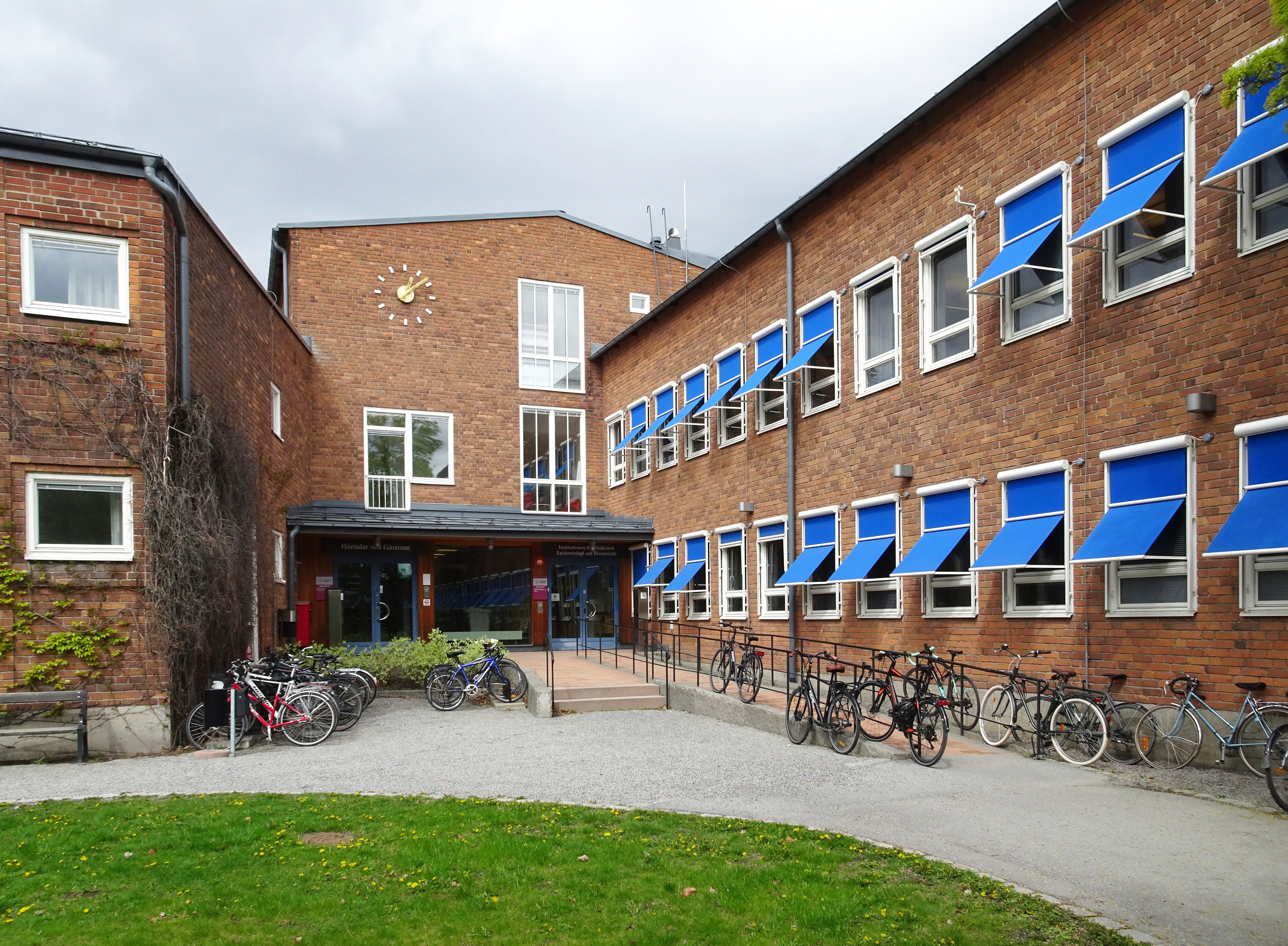 Wargentinhuset (tidigare "Anatomen") är en f.d. laboratoriebyggnad som ursprungligen uppfördes 1945–1946 och ritades då av arkitekt Ture Ryberg. Huset har tidigare inrymt Anatomiska och Histologiska Institutionen och var en av de första byggnader som färdigställdes på området.